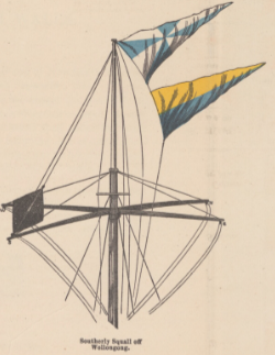 Signal d'avertissement montrant 'buster du sud' à Wollongong